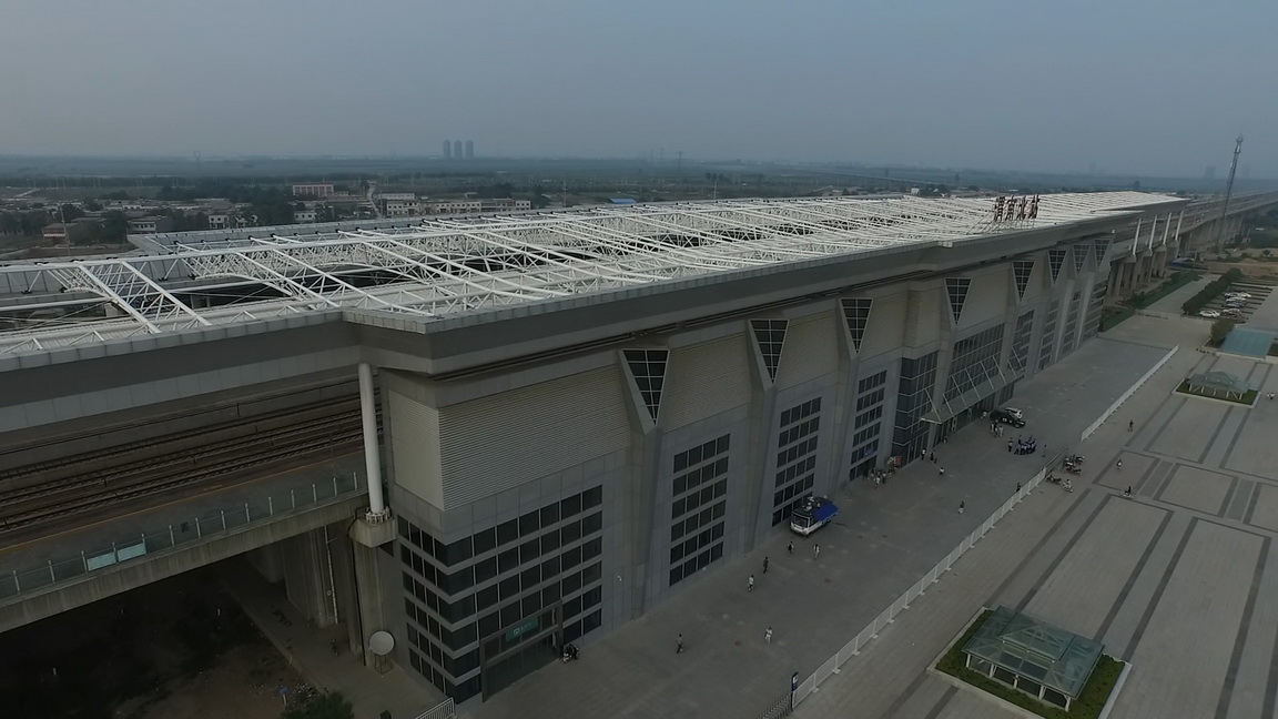 中文（中国大陆）: 渭南北站南广场航拍